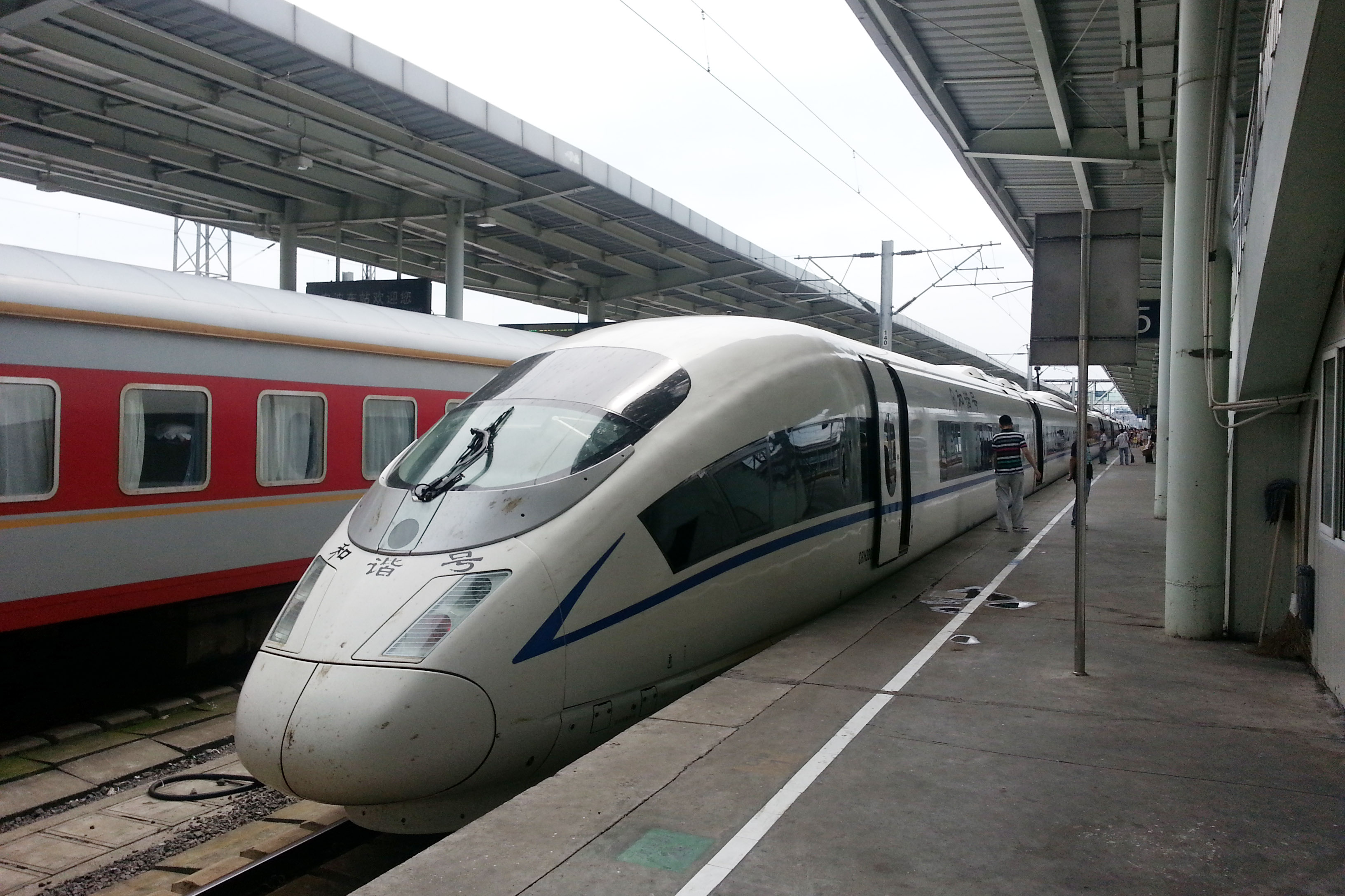 停靠于宁波东站的CRH380BL（车号6238）列车